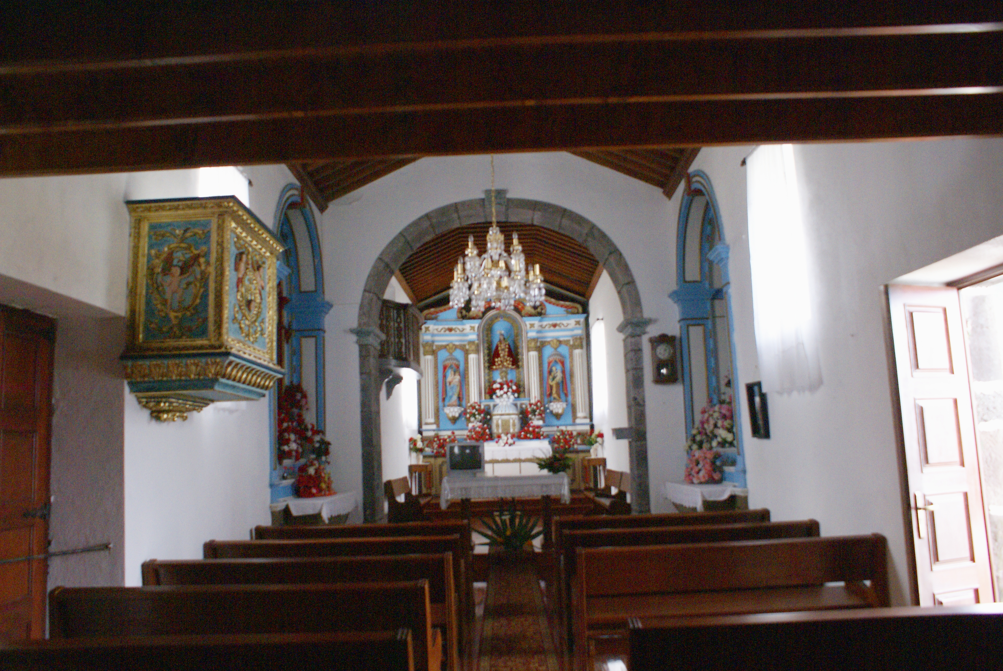 Interior nave of the Church of Santo Cristo, Fajã da Caldeira de Santo Cristo, Ribeira Seca, Calheta, São Jorge (Azores), Portugal